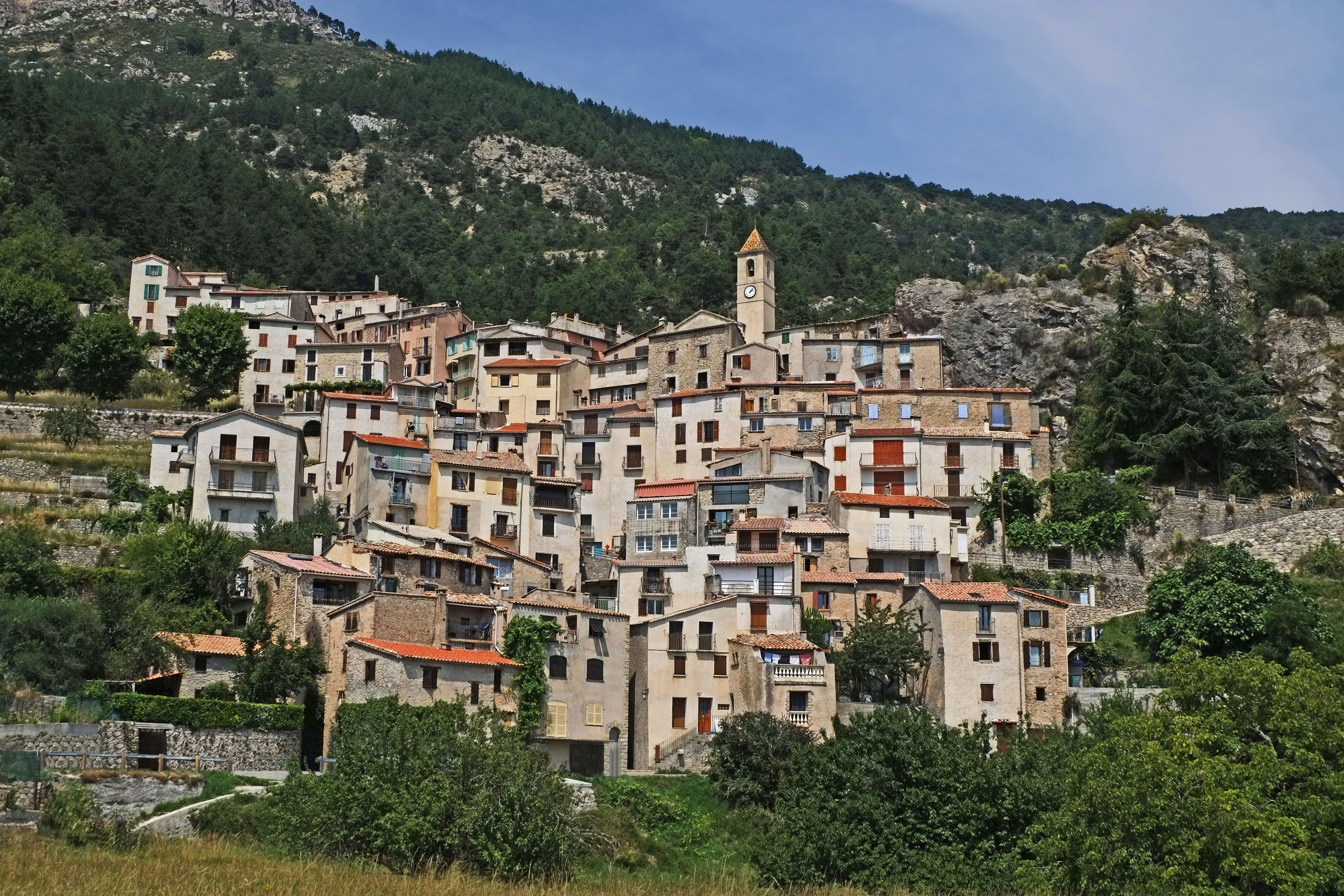 Vue de Toudon depuis le bas du village